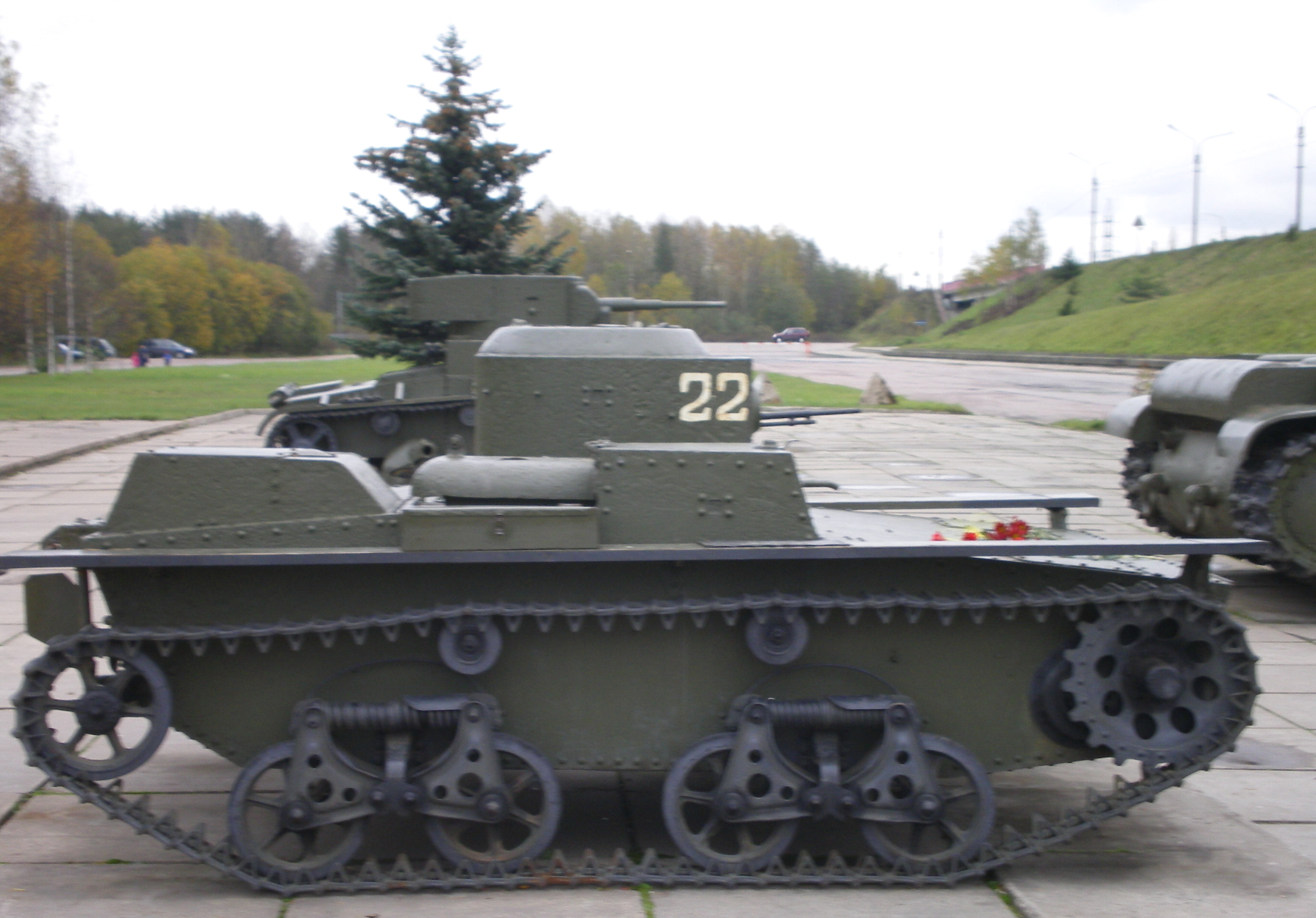 Танк Т-38. Вид справа. Диорама «Прорыв блокады Ленинграда». Экспозиция военной техники периода 1941–1944 годов под открытым небом.